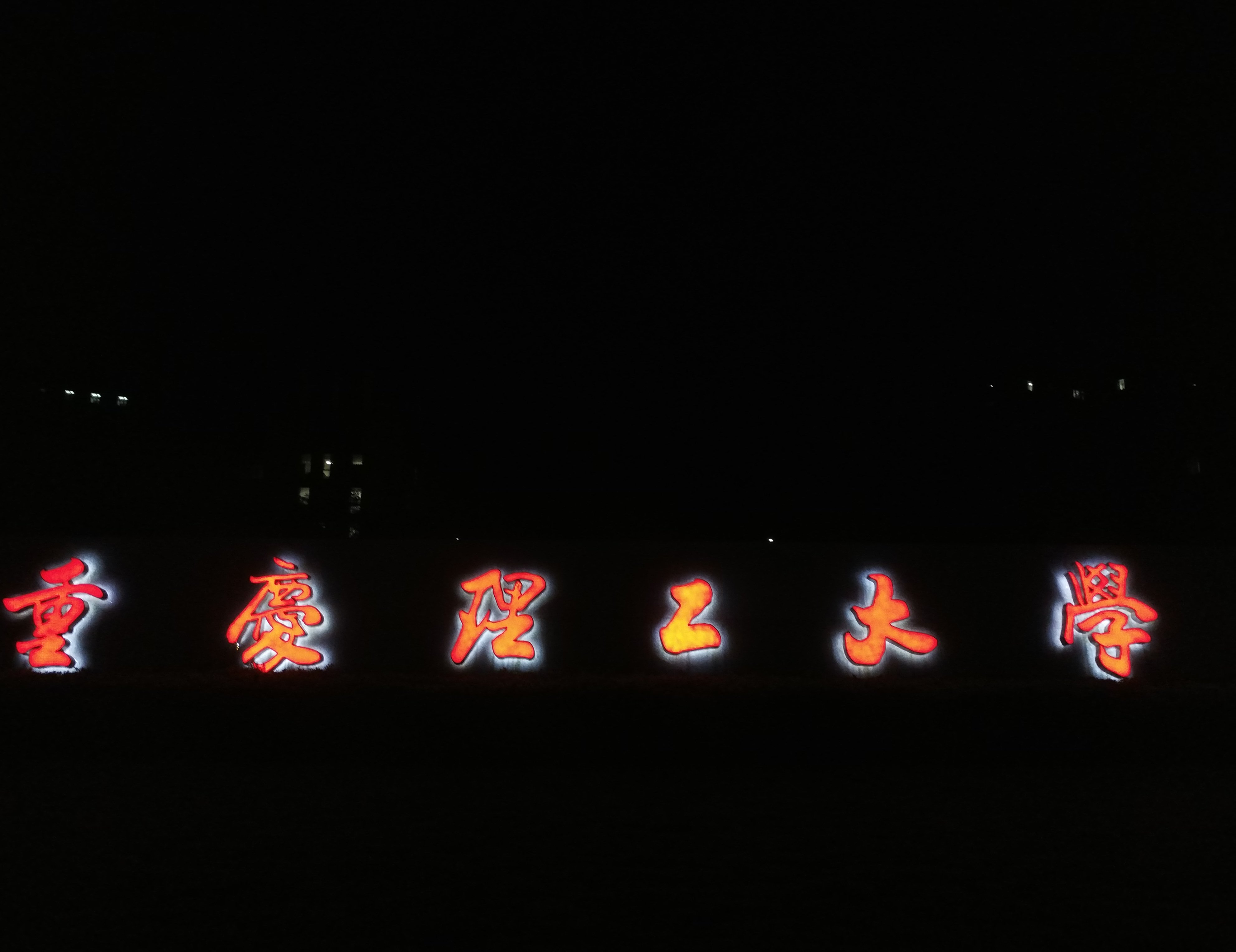 中文（中国大陆）: 重庆理工大学夜景，学校大门印刻着由欧阳中石题写的校名，主色调为红色、背景为白色象征重庆理工大学代表色。